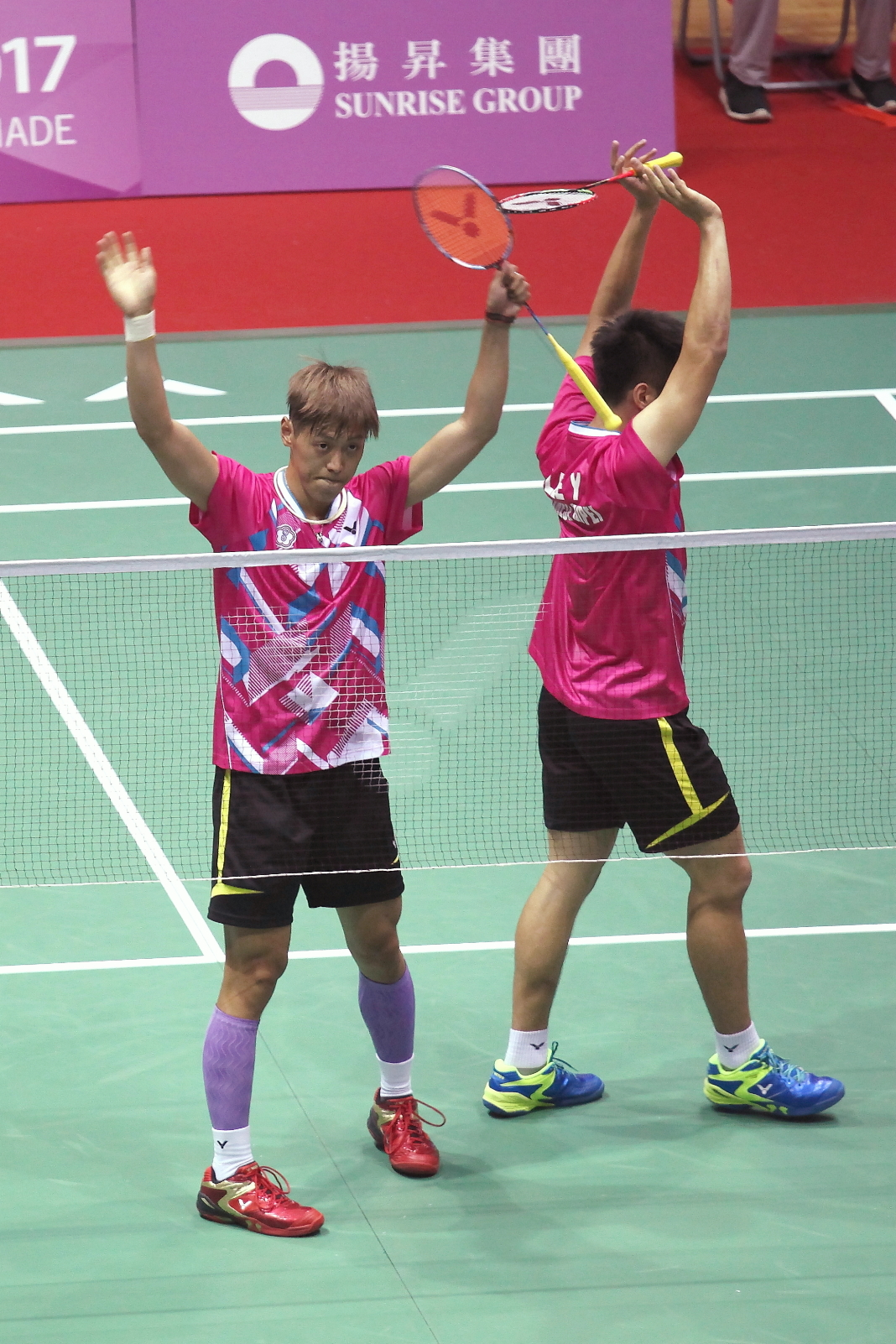 2017 臺北世大運個人男雙 李哲輝 01